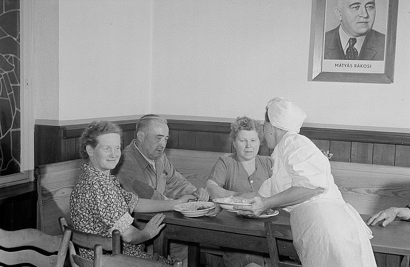 Original image description from the Deutsche Fotothek Drei Angestellte des VEB Bodenbearbeitungsgeräte bekommen von einer Kellnerin ihr Werksküchenessen ausgeteilt, im Hintergrund ein Portrait von Mátyás Rákosi